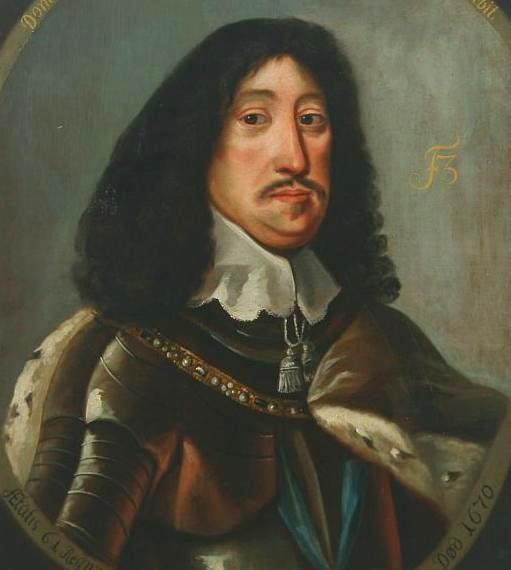 Portrait du roi Frederik III